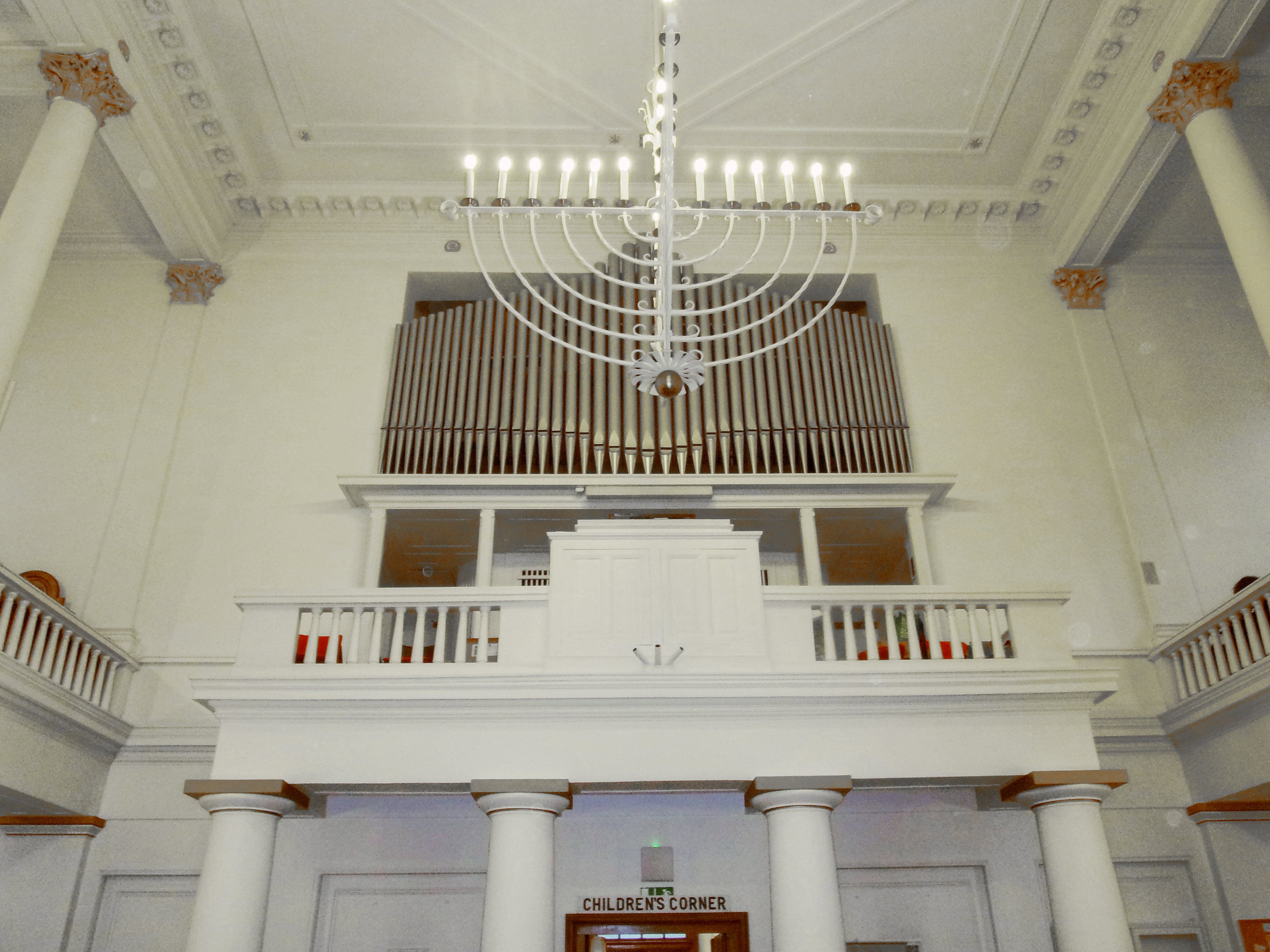 Innenansicht der Thomas Becket Church am Zeughausmarkt in der Hamburger Neustadt. Die anglikanische Kirche hat weder Turm noch Glockenspiel, sie gilt als klassizistische Saalkirche mit Flachdach und Emporen. Gottesdienste und Gesang sind grundsätzlich in englischer Sprache. Kinder haben einen eigenen Bereich, unterhalb der Orgel befindet sich die Childrens Corner. Mehr zur Gemeinde im folgenden Link vom HH-Abendblatt; This is a photograph of an architectural monument.